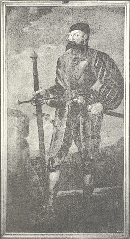 Wilhelm Graf zu Fürstenberg (1491-1549); Ölgemälde in Lebensgröße auf Schloss Heiligenberg